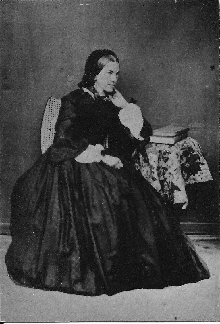 Pósfai Horváth Györgyné Fleischaker Emília